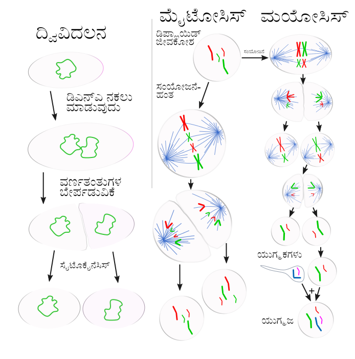 ಕನ್ನಡ: ದ್ವಿವಿದಲನ ಮತ್ತು ಯೂಕ್ಯಾರಿಯೋಟ್‌ಗಳು ಮೈಟಾಸಿಸ್ ಮತ್ತು ಮಿಯಾಸಿಸ್ ಕೋಶ ವಿಭಜನೆ